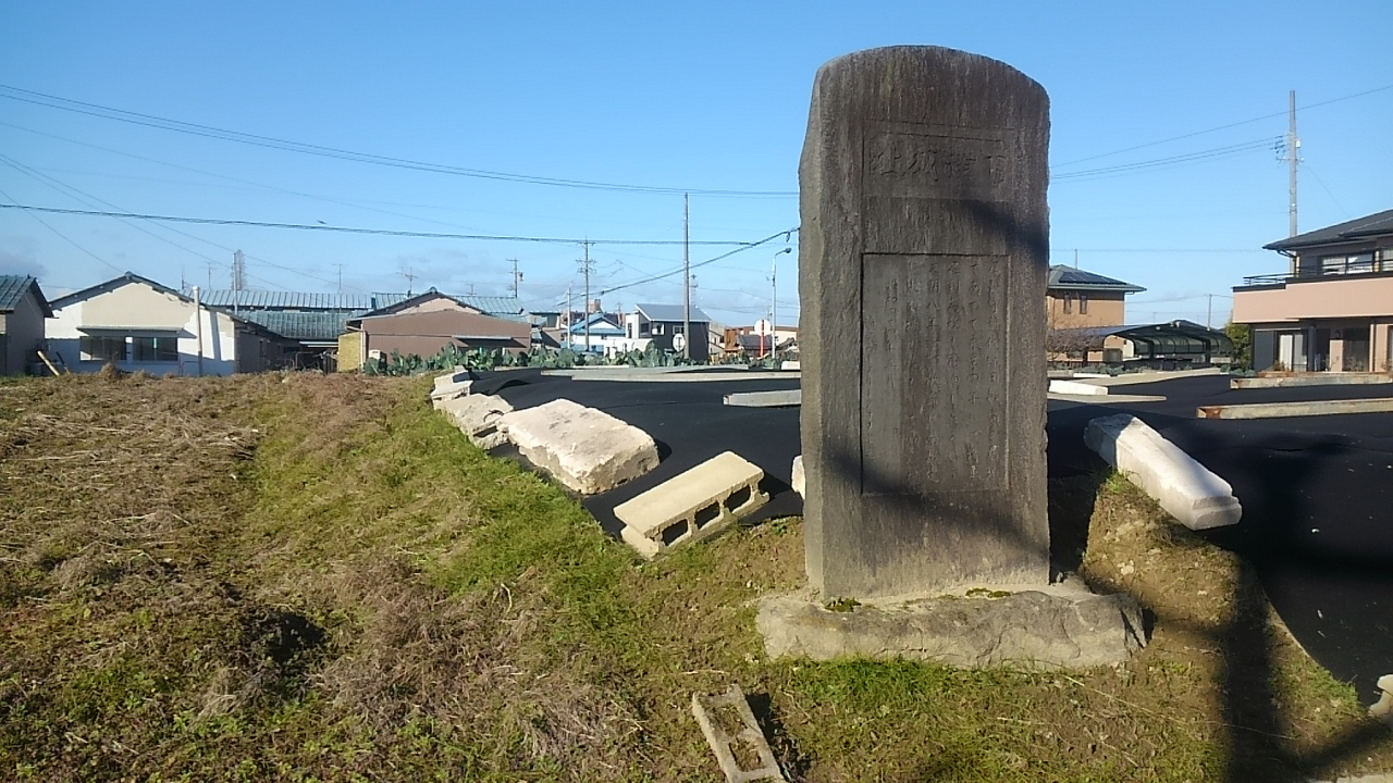 下津城址の碑